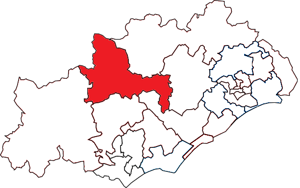 Situation du canton dans le département de l'Hérault